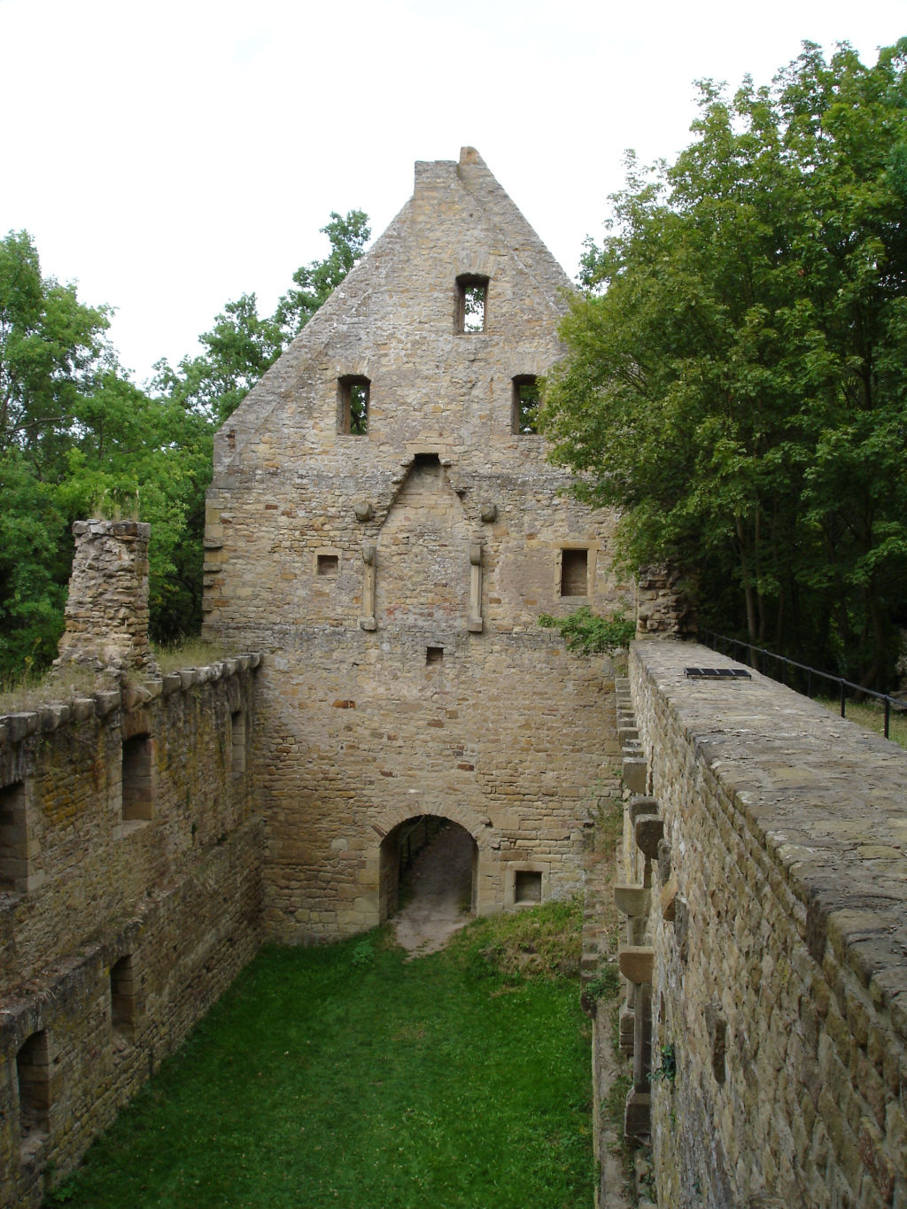 Kloster Disibodenberg: Giebel des Hospitals, Gästehaus, erbaut nach 1400.